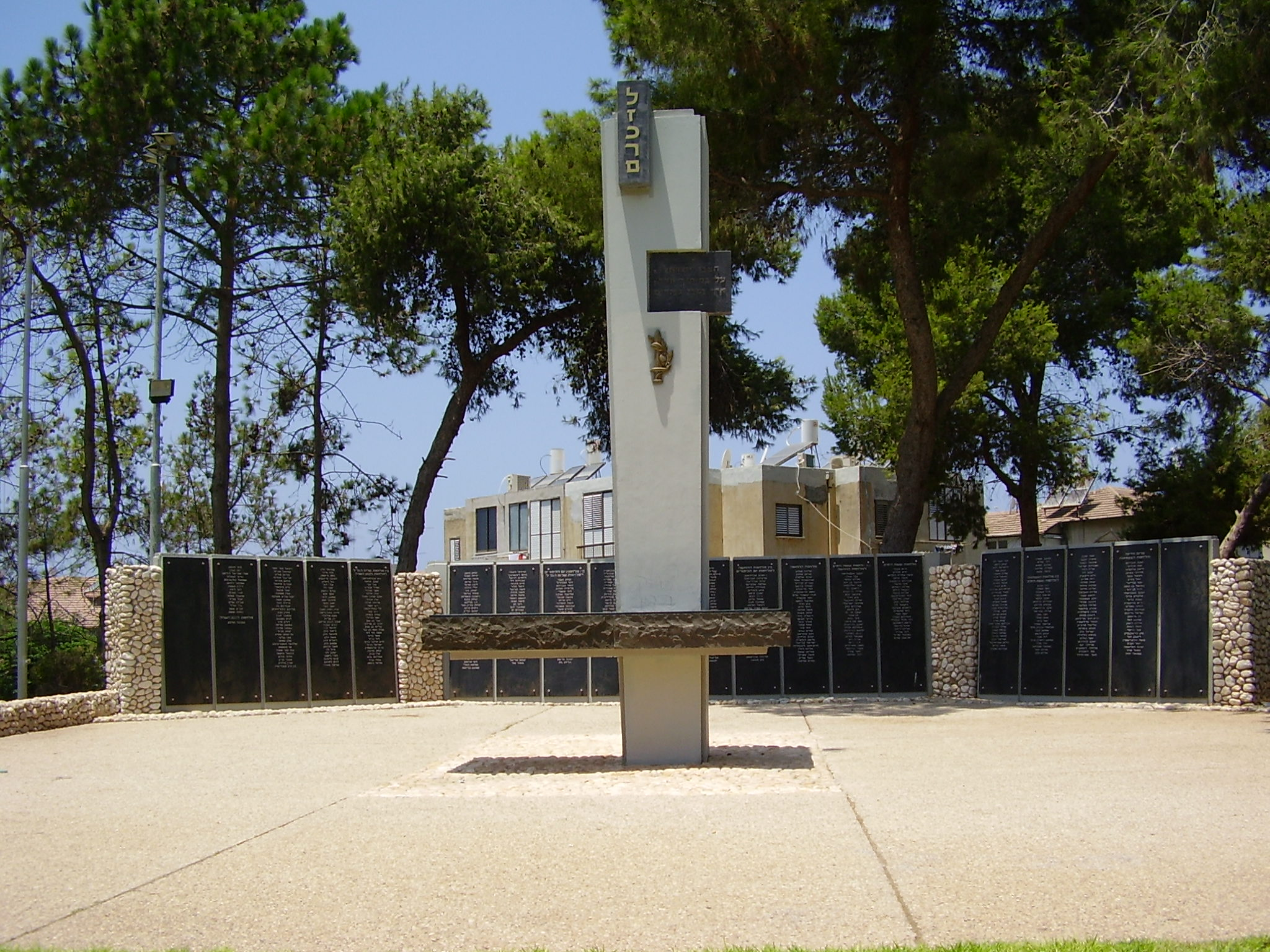 war memorial in bat yam אנדרטה בבת ים לנופלים במערכות ישראל